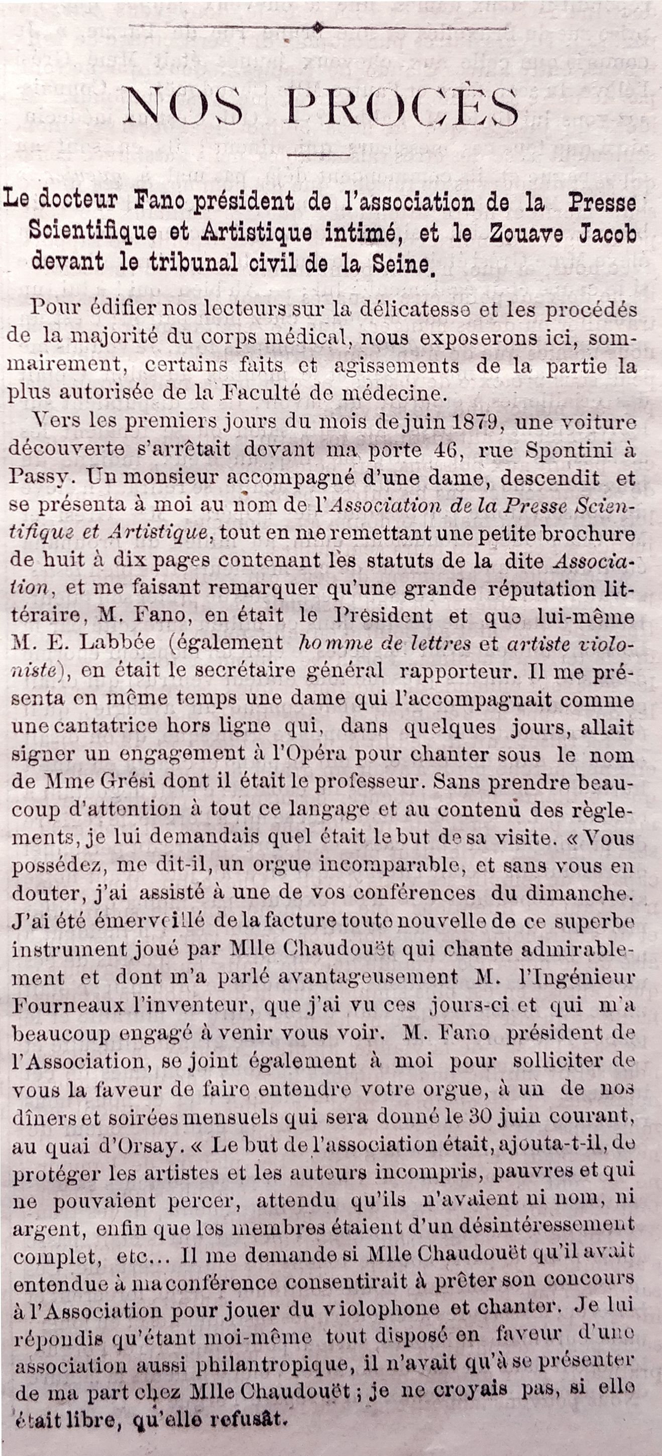 Article.